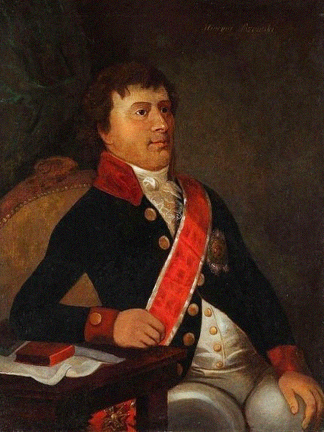 Portret Hiacynta Janoty Bzowskiego eksponowany w Muzeum Krakowa.